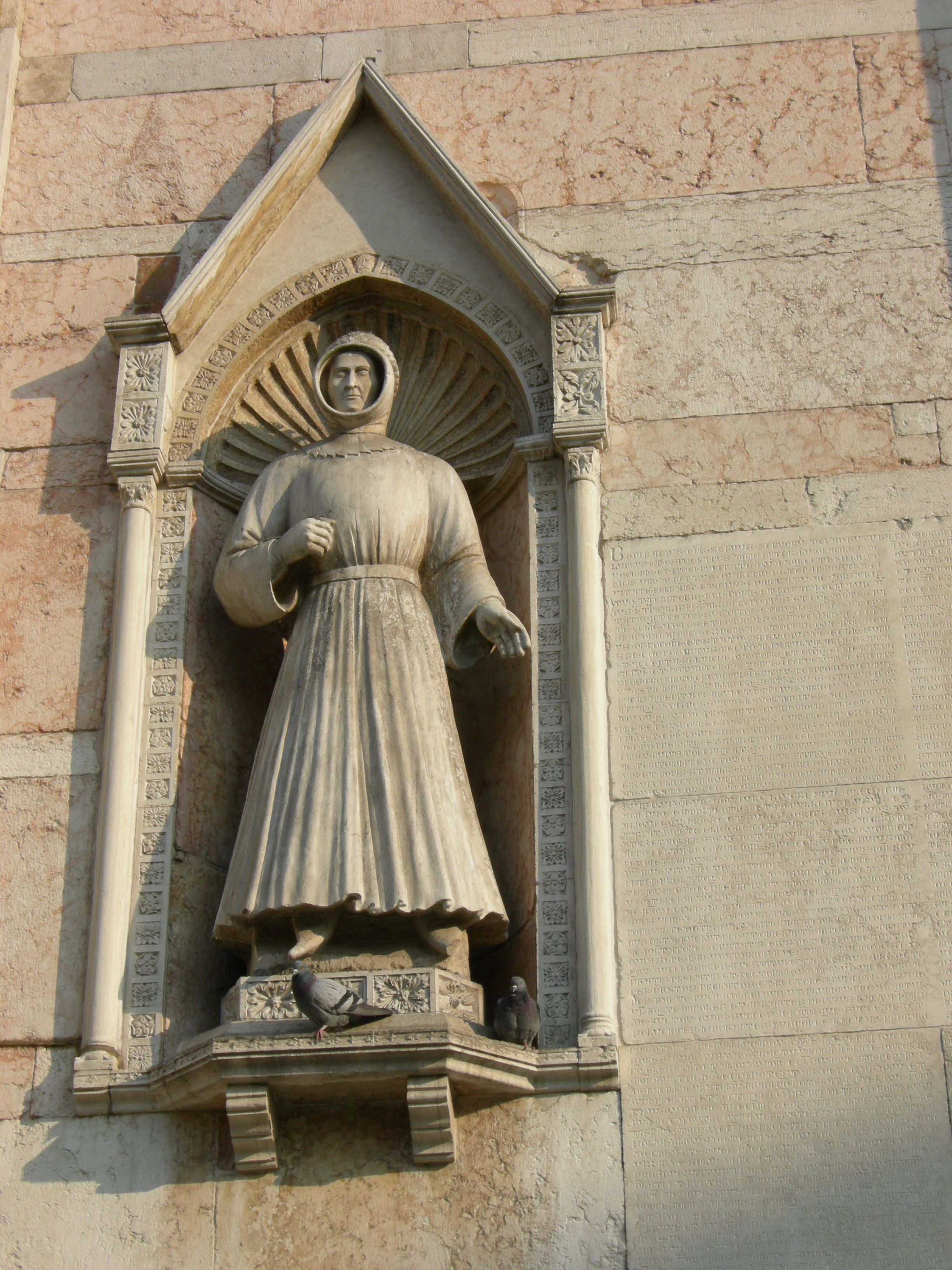 Marchese Alberto V d'Este in abiti da pellegrino mentre indica la bolla con i privilegi concessi agli Estensi da papa Bonifacio IX nel 1391